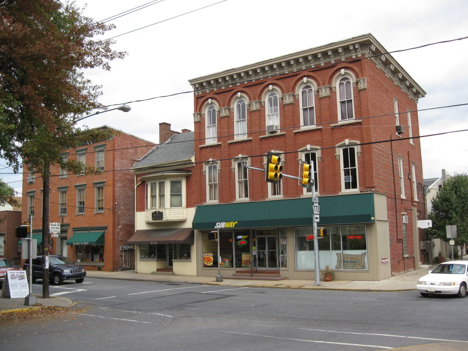 Manheim, Pennsylvania